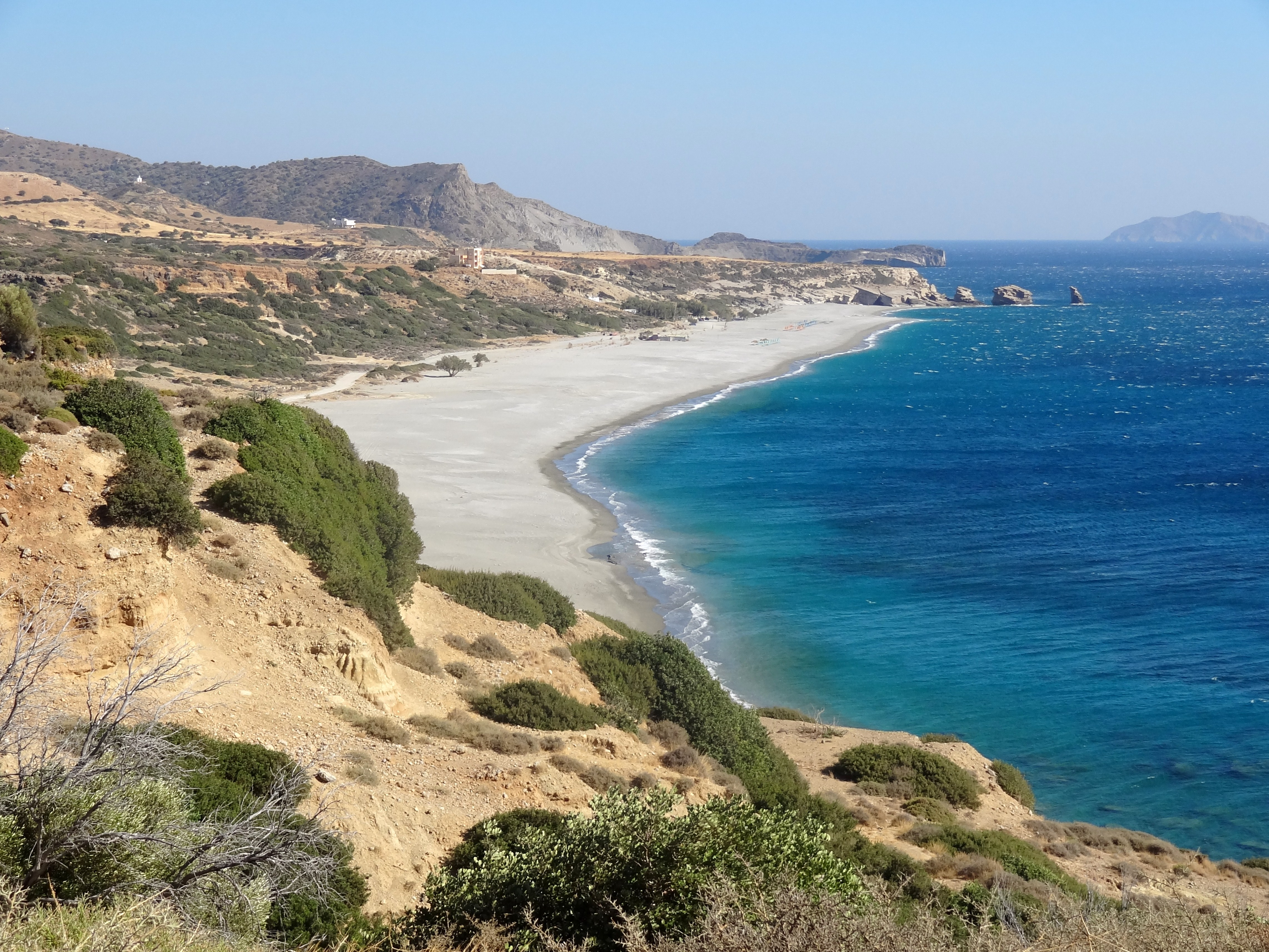 Strand von Triopetra (Τριόπετρα), Regionalbezirk Rethymno, Kreta, Griechenland